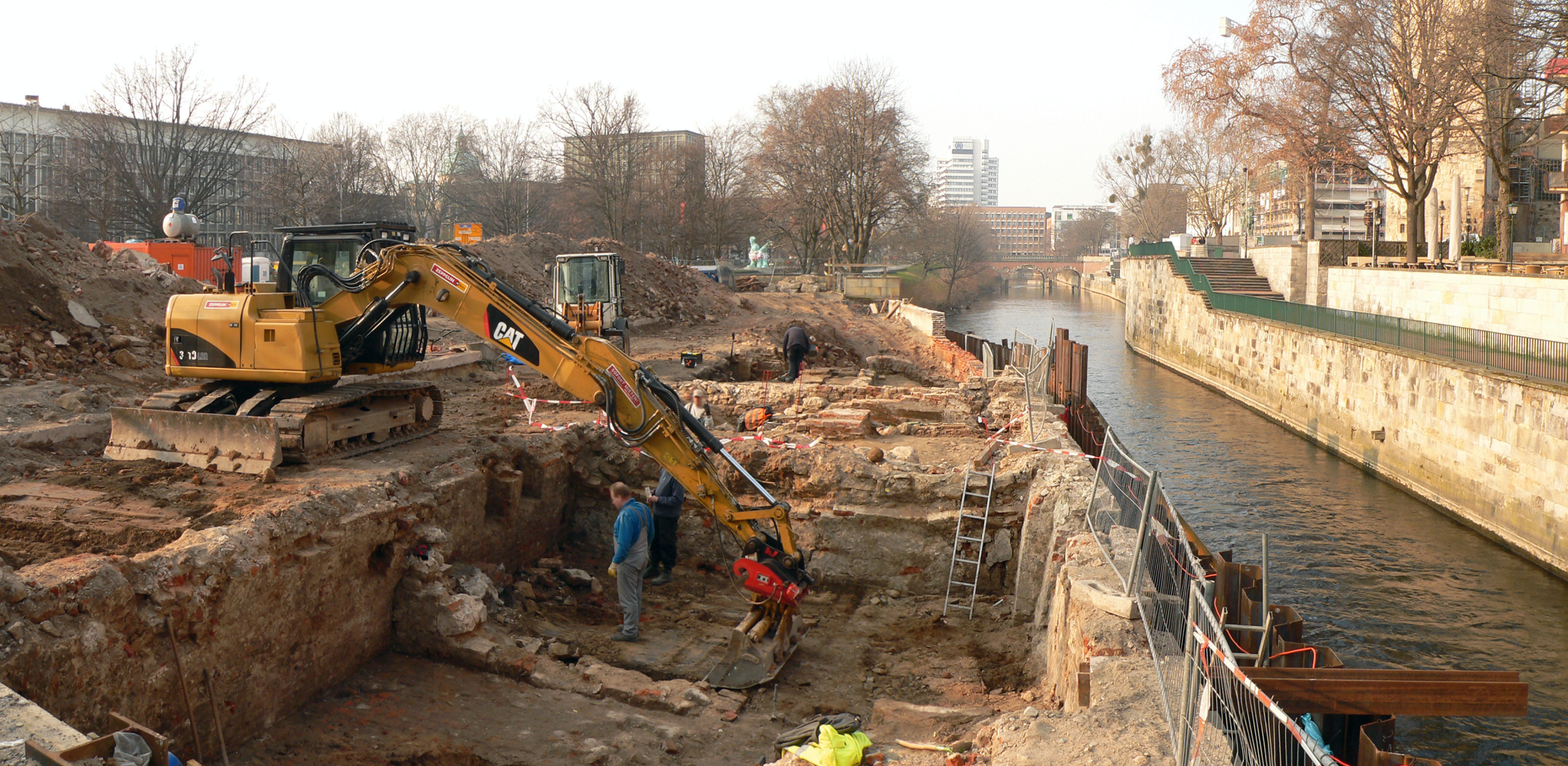 Ausgrabung an der Ufermauer der Leine auf der früheren Leineinsel Klein-Venedig, gesehen von der Schlossbrücke